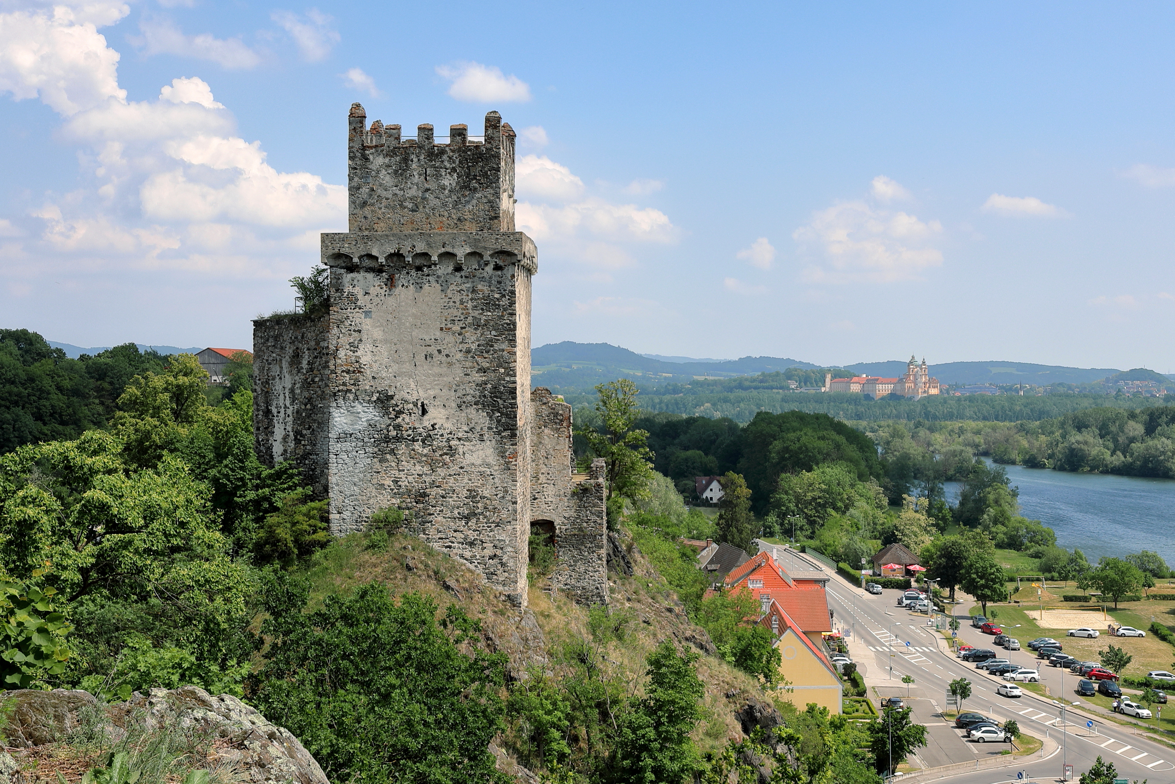 Westansicht der Burgruine in Weitenegg, ein Ortsteil der niederösterreichischen Marktgemeinde Leiben, und rechts im Hintergrund ein Donauarm sowie das Stift Melk.Die weitläufige Burganlage in Ost-West-Richtung ist urkundlich 1108 genannt. Der markante Bergfried wurde im 12. Jahrhundert errichtet und im Spätmittelalter um 2 Geschosse erhöht. Seit Mitte des 18. Jahrhunderts ist die Burg dem Verfall preisgegeben.